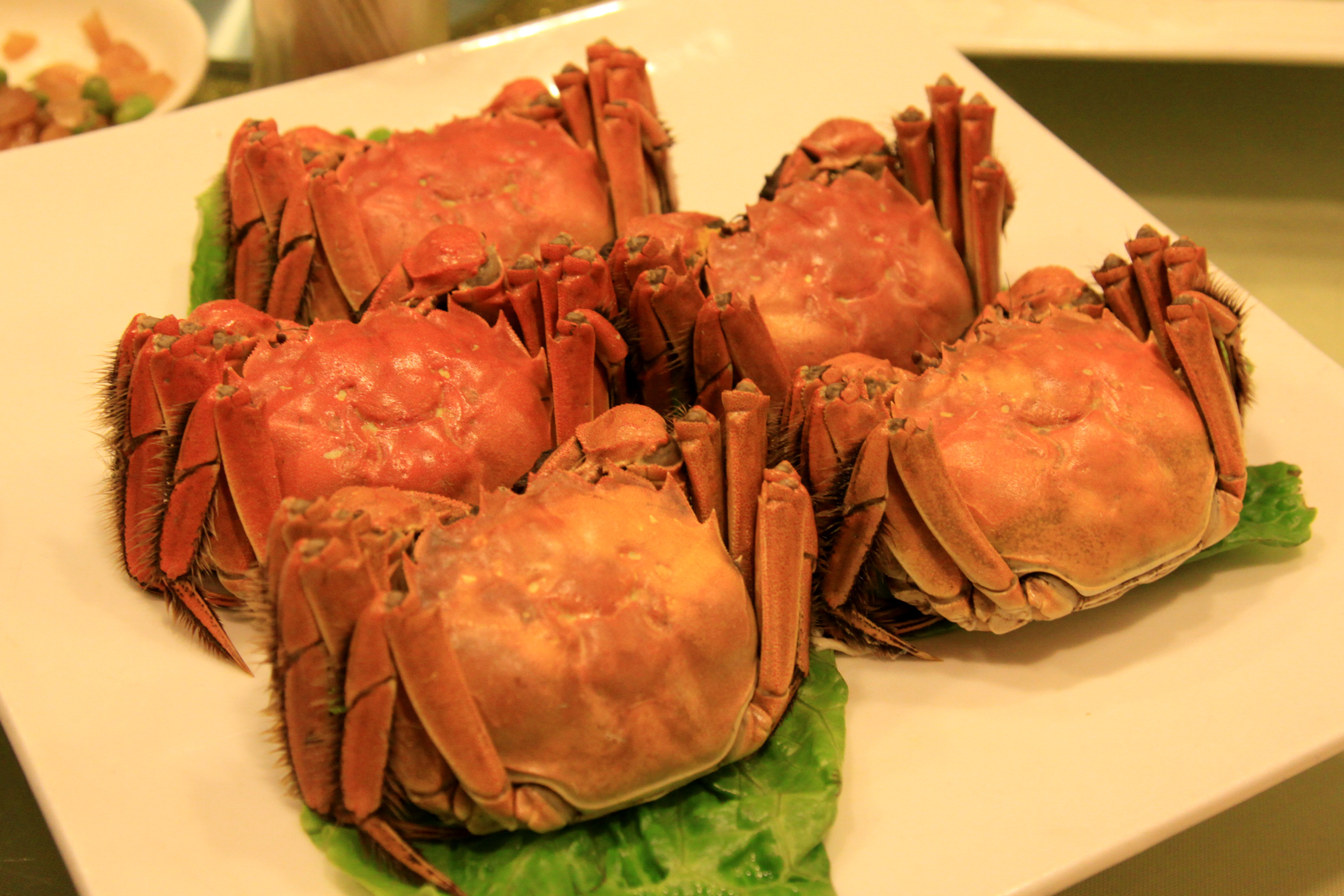 上海蟹(上海毛蟹, Shanghai hairy crab)